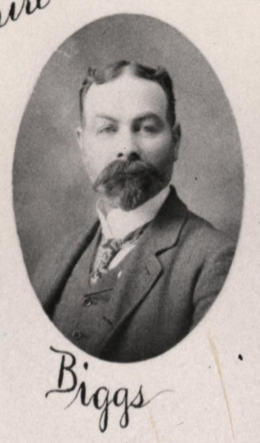 Sen DE Biggs